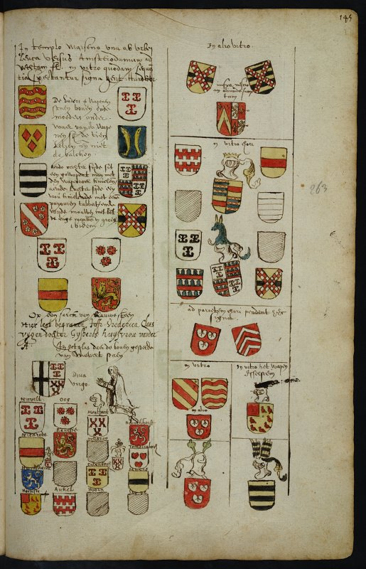 "Monumenta Van Buchel", blz 263 (fol. 145r)